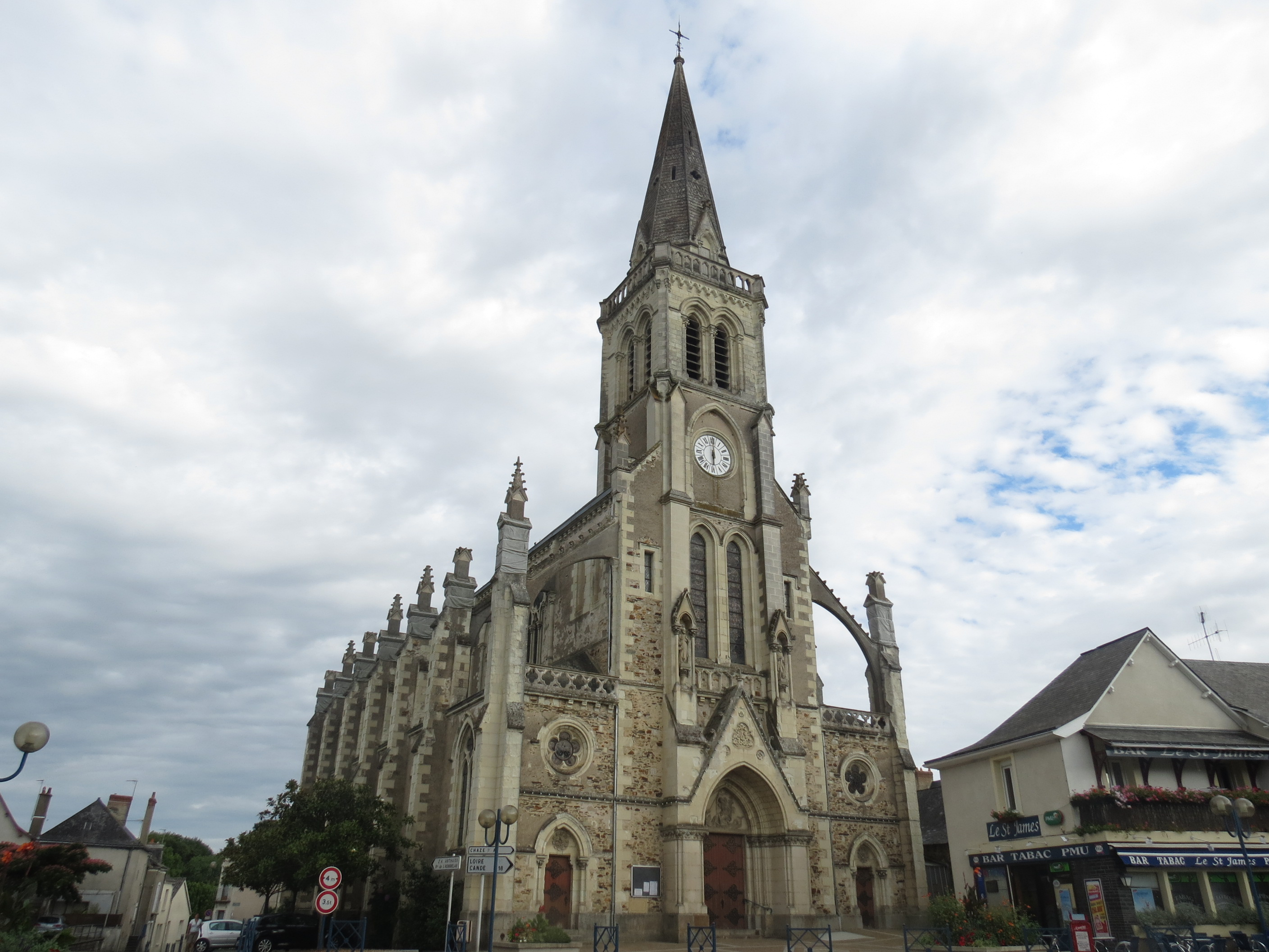 Église Sainte-Gemmes de Sainte-Gemmes-d'Andigné.